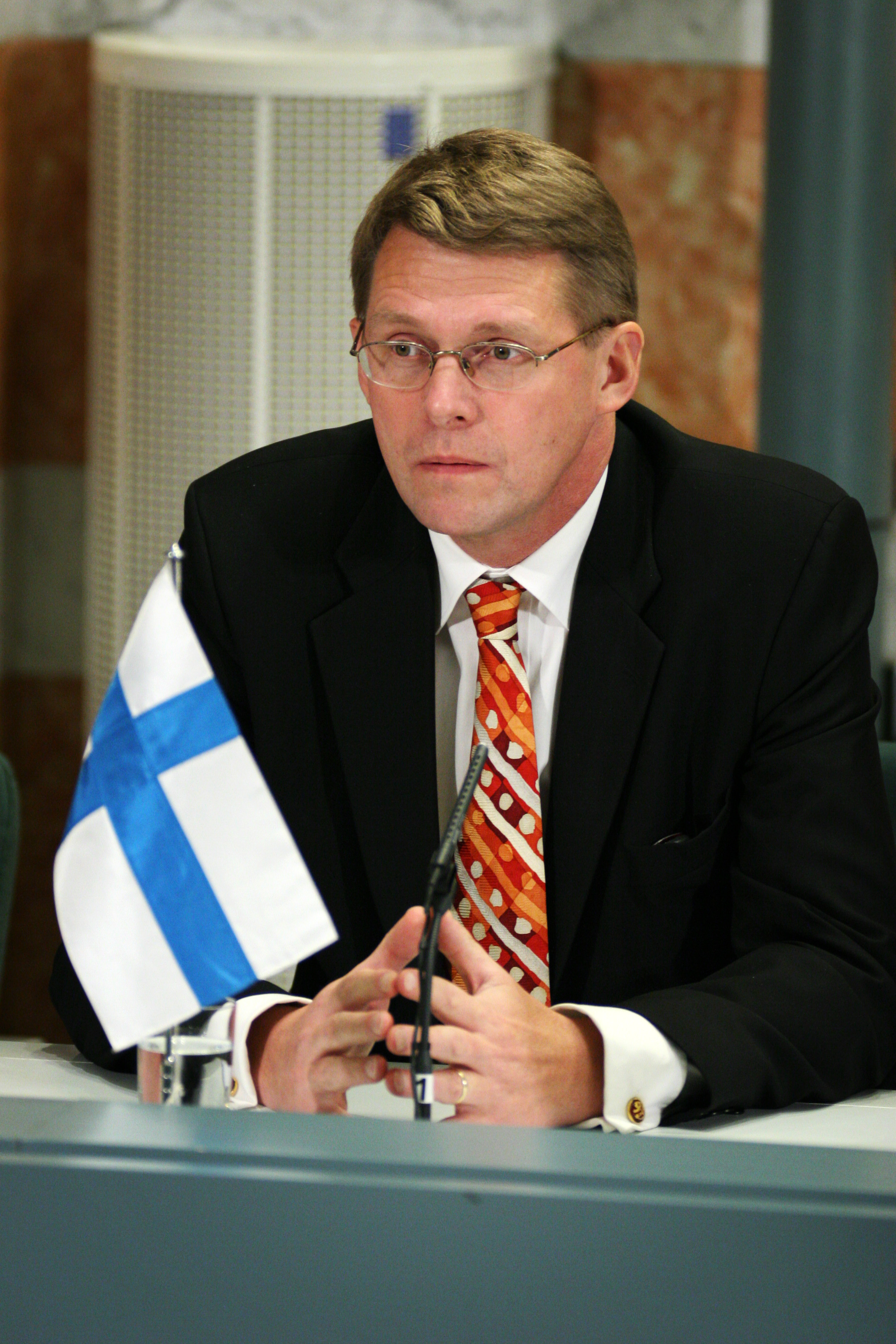 Matti Vanhanen, Finlands statsminister, under presskonferens vid Nordiska rådets session i Stockholm.